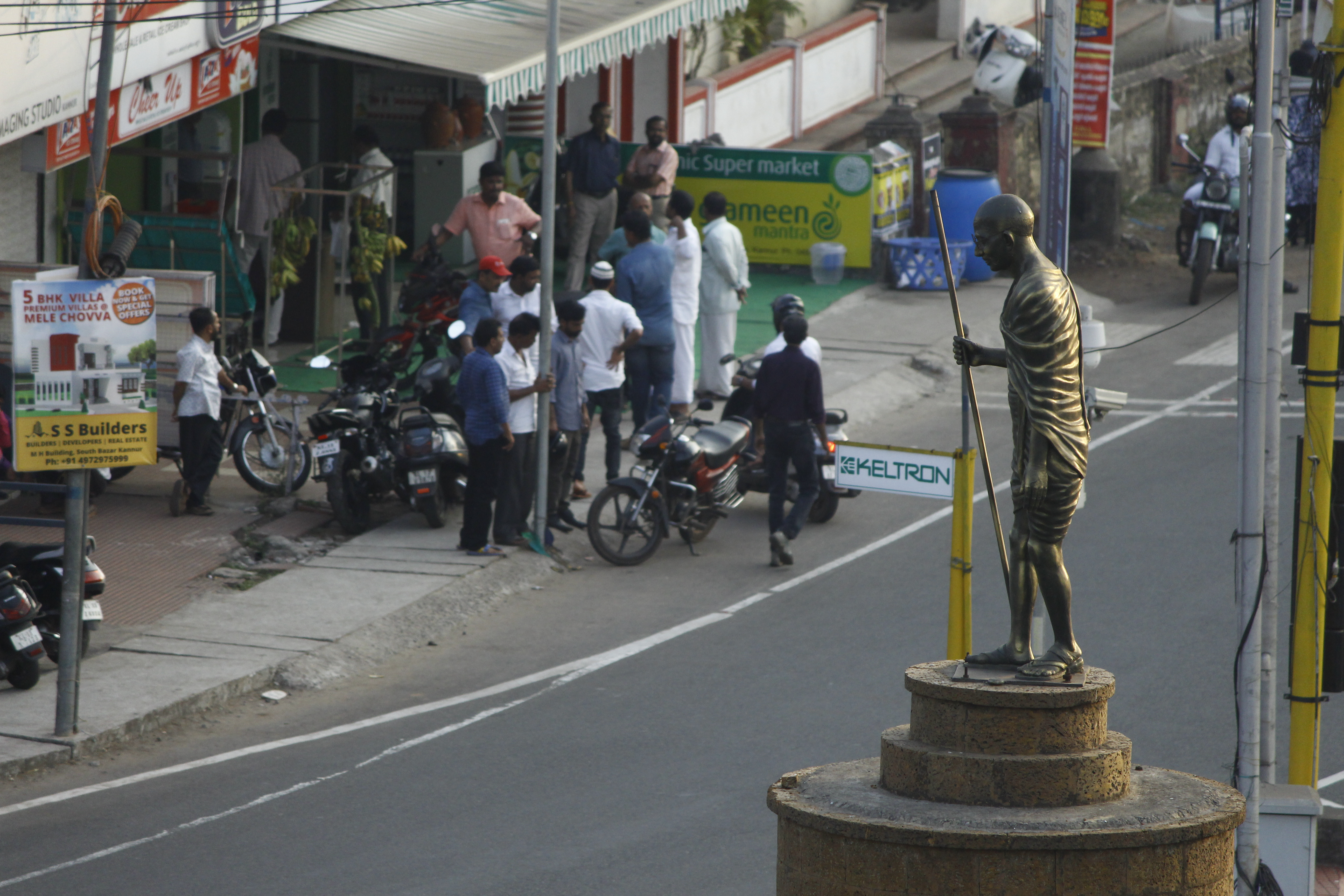 ഗാന്ധി പ്രതിമ,ഗാന്ധി സെർക്കിൾ,കാൽടെക്സ്